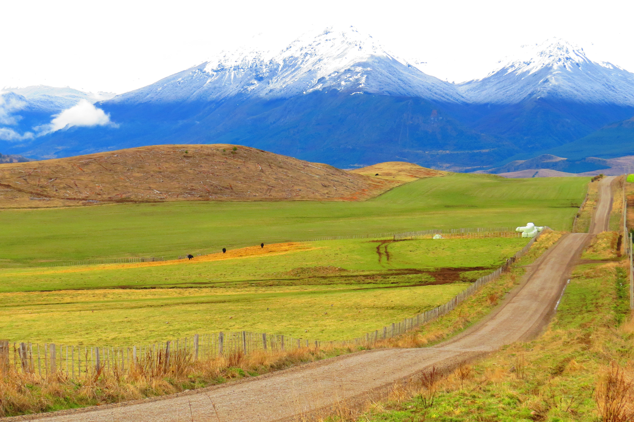 500px provided description: Paisajes y personajes t?picos de la carretera austral en la patagonia chilena,en las cercan?as de las ciudades de Coyhaique y Balmaceda [#Coyhaique ,#Chile ,#Patagonia ,#Campo ,#Aysen ,#Carretera Austral ,#Balmaceda]